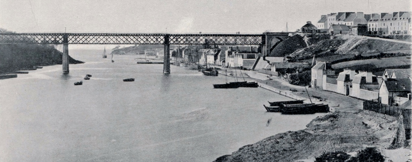 Le viaduc de Douarnenez au-dessus de la rivière de Pouldavid (actuel Port-Rhu) vers 1900 (il met en communication Douarnenez avec Tréboul et sa gare)